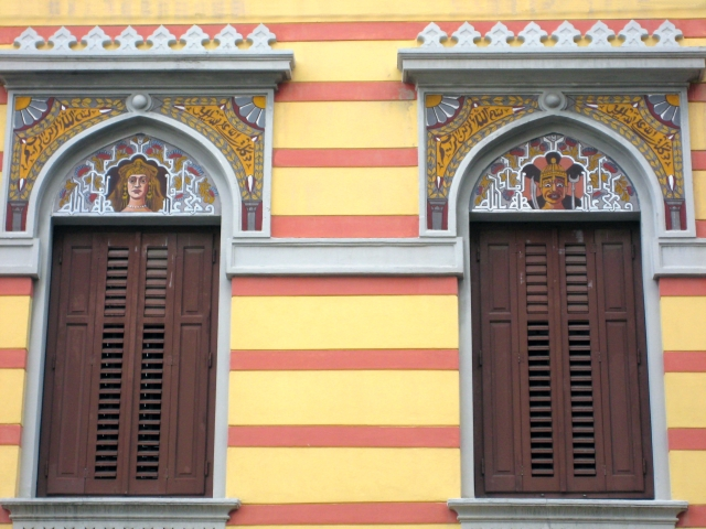 "Turska kuća" ("Casa turca") u Rijeci